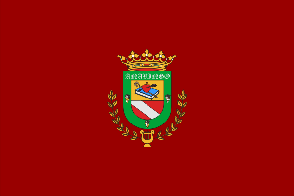 Bandera de Arafo (Santa Cruz de Tenerife, España)